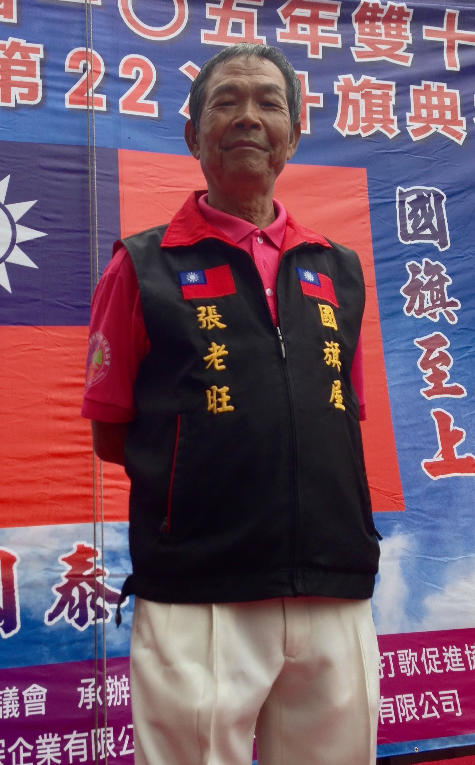 中文（台灣）: 國旗屋店主張老旺